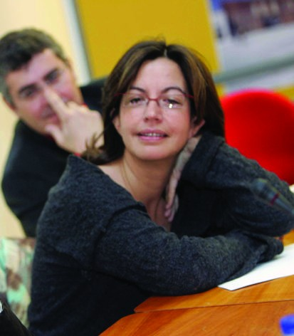 Juan Ramon Lucas y Angels Barcelo